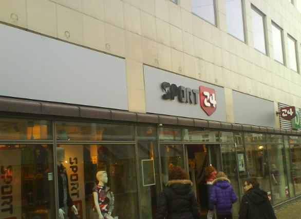 Sport24 Haderslev